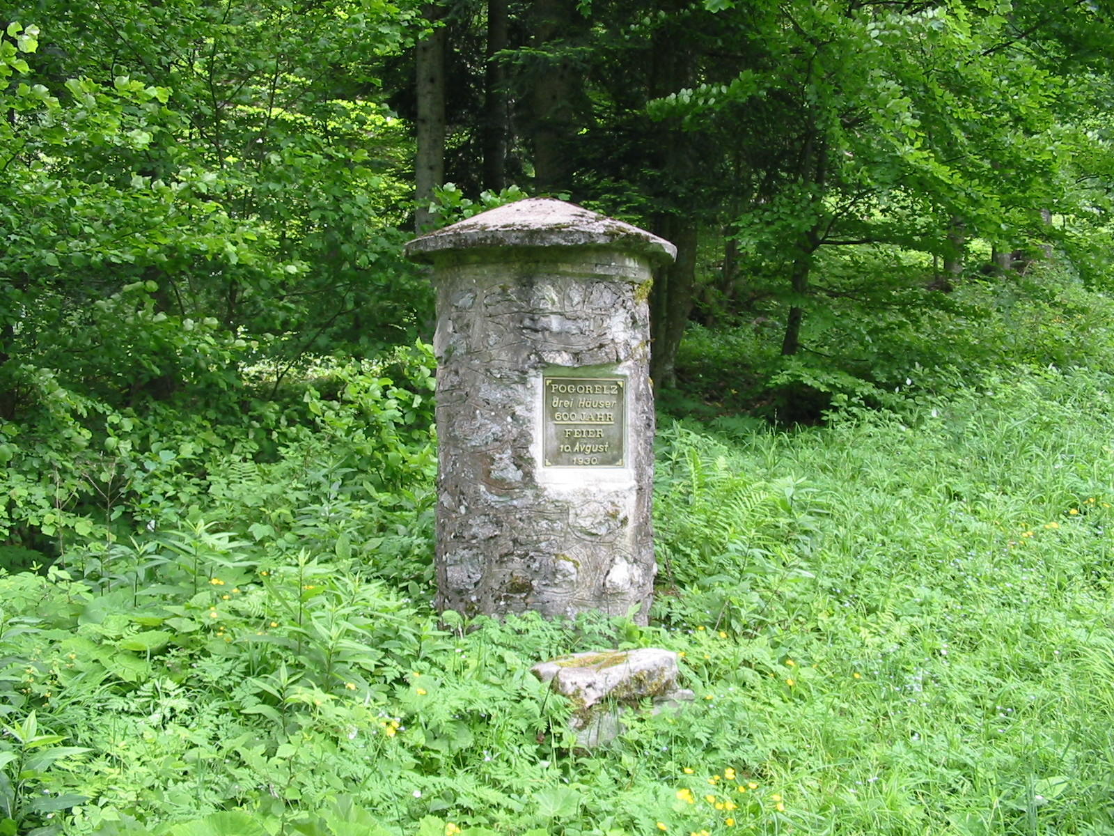 Pogorelec - Monument